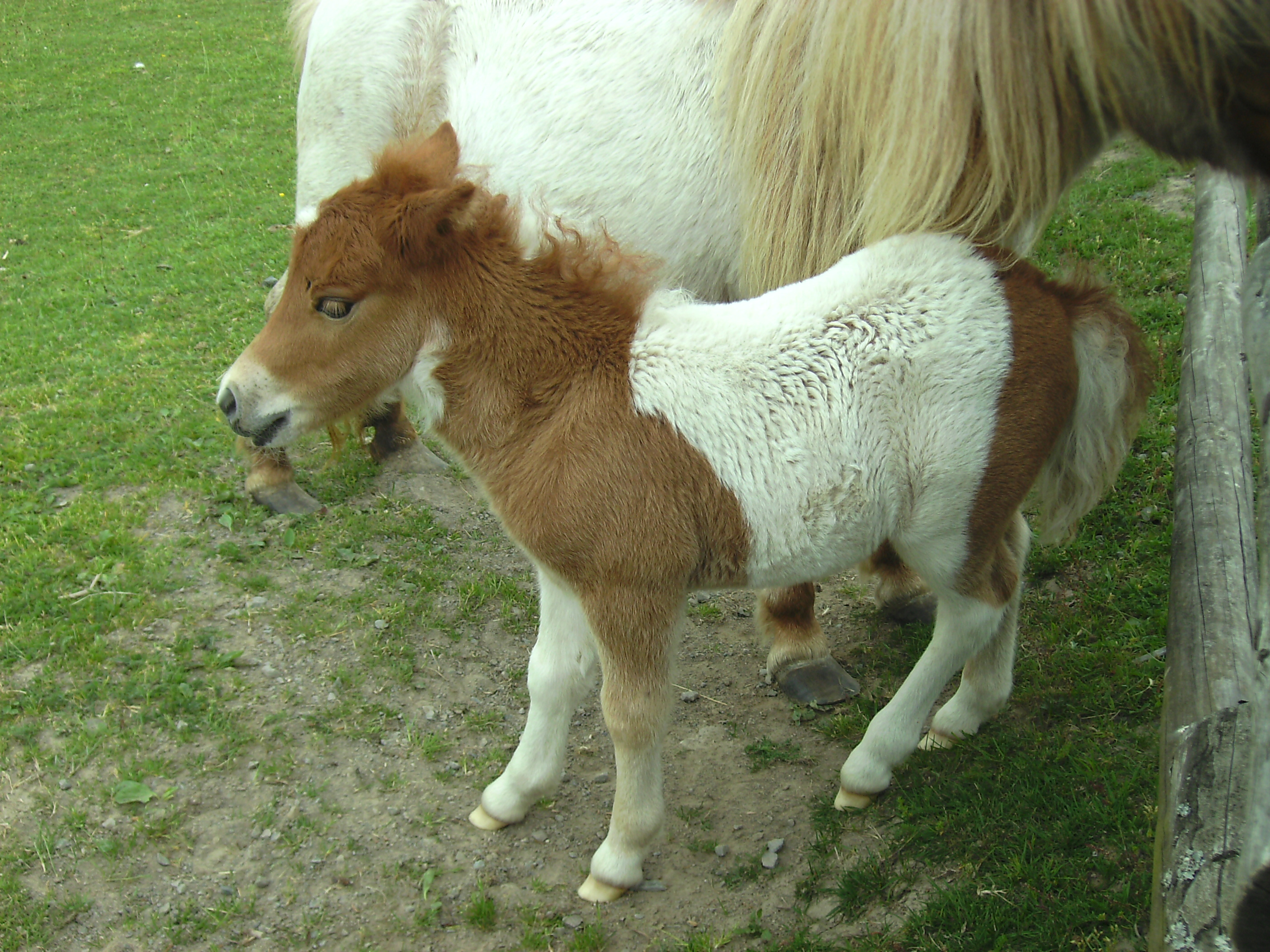 Pony-Fohlen (Kleinpferd)